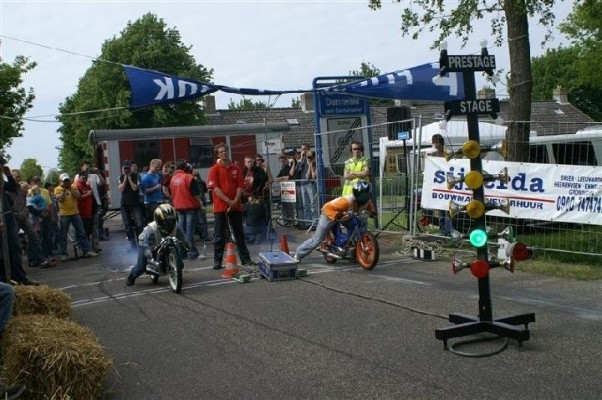 Brommersprint draait kortgezegd om het op een opgevoerde brommer zo snel mogelijk afleggen van een parcours van 150 meter. Eigen foto